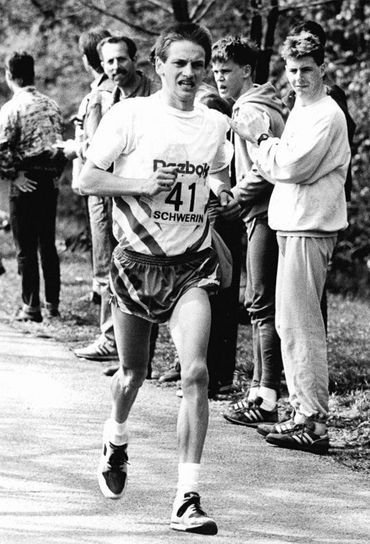 ADN-Pätzold / 22.4.90 / Schwerin: Straßenmeisterschaft Michael Heilmann von der BSG Motor Teltow verteidigt in der Bezirksstadt bei den DDR-Straßenlaufmeisterschaften über 20 km seinen DDR-Meistertitel Abgebildete Personen: Heilmann, Michael: Marathonläufer, DDR